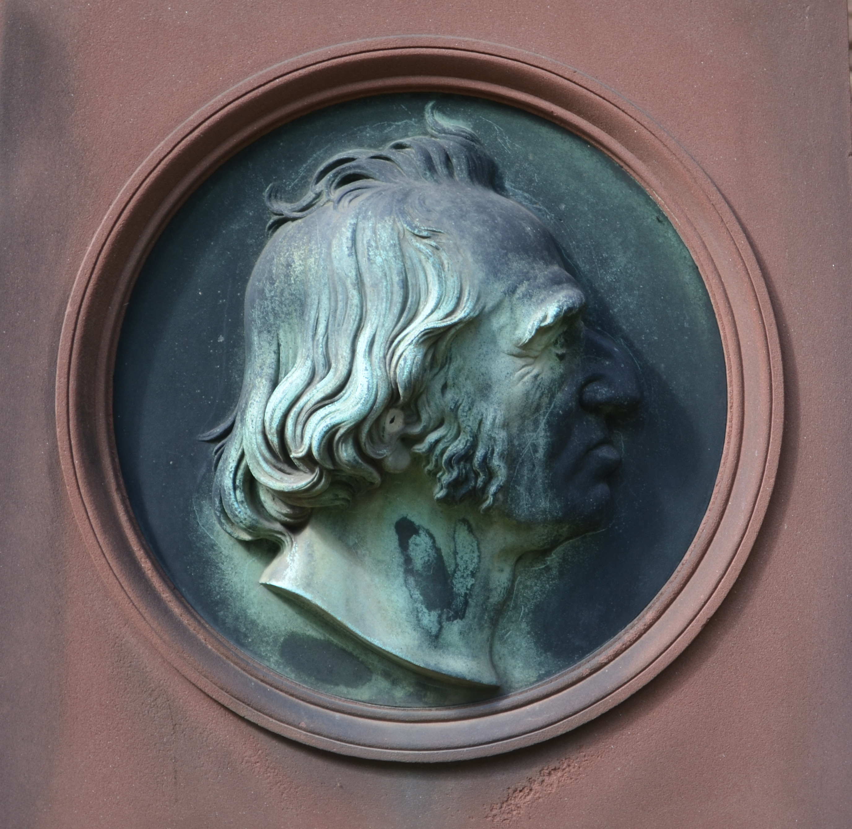 Frankfurt, Hauptfriedhof, Grab E adM 415-417 Reiss-Stiebel, Salomon Friedrich Stiebel